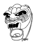 Гэндзёраку - маска бугаку